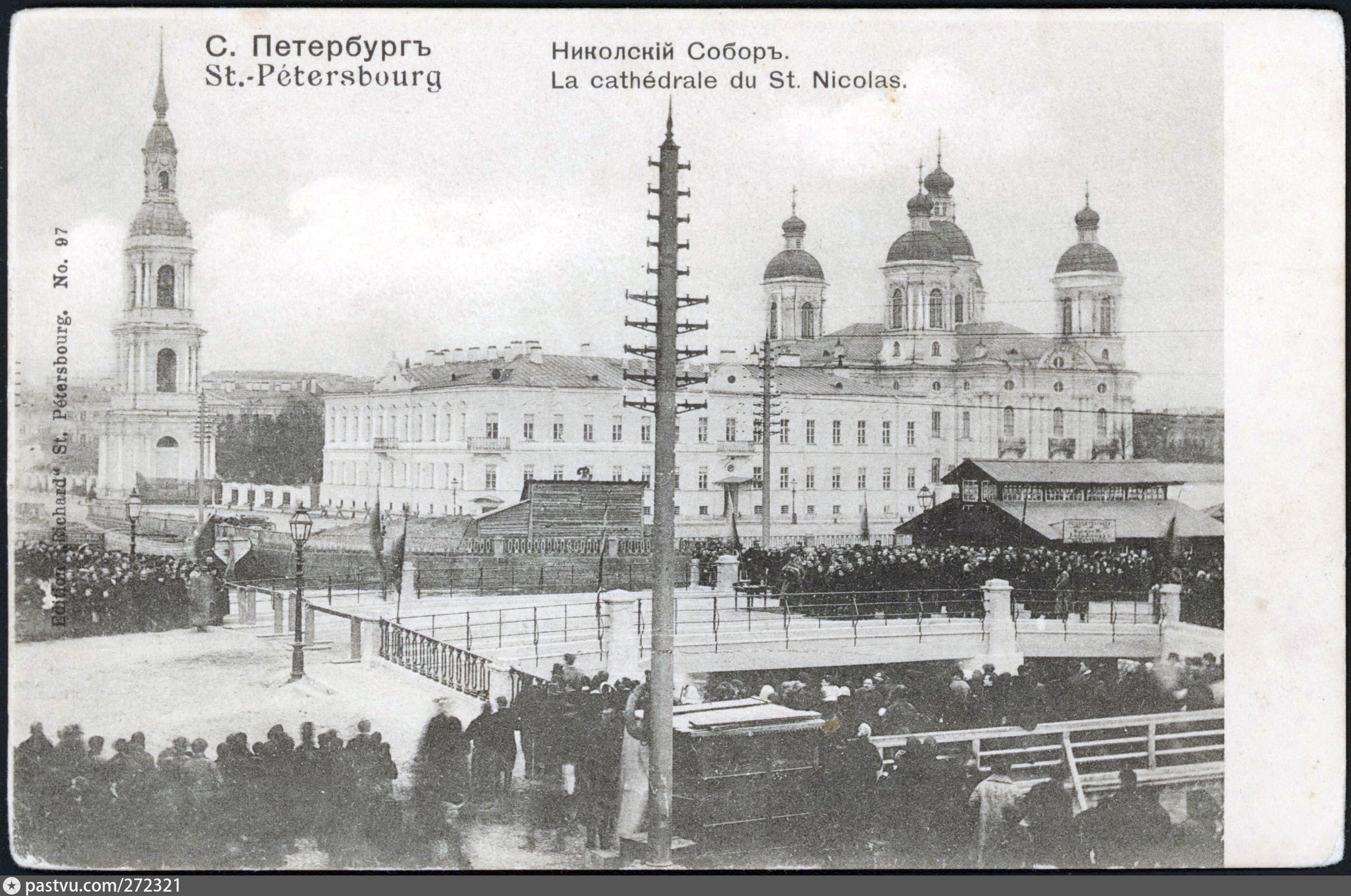 Открытка с изображением открытия Старо-Никольского моста после реконструкции